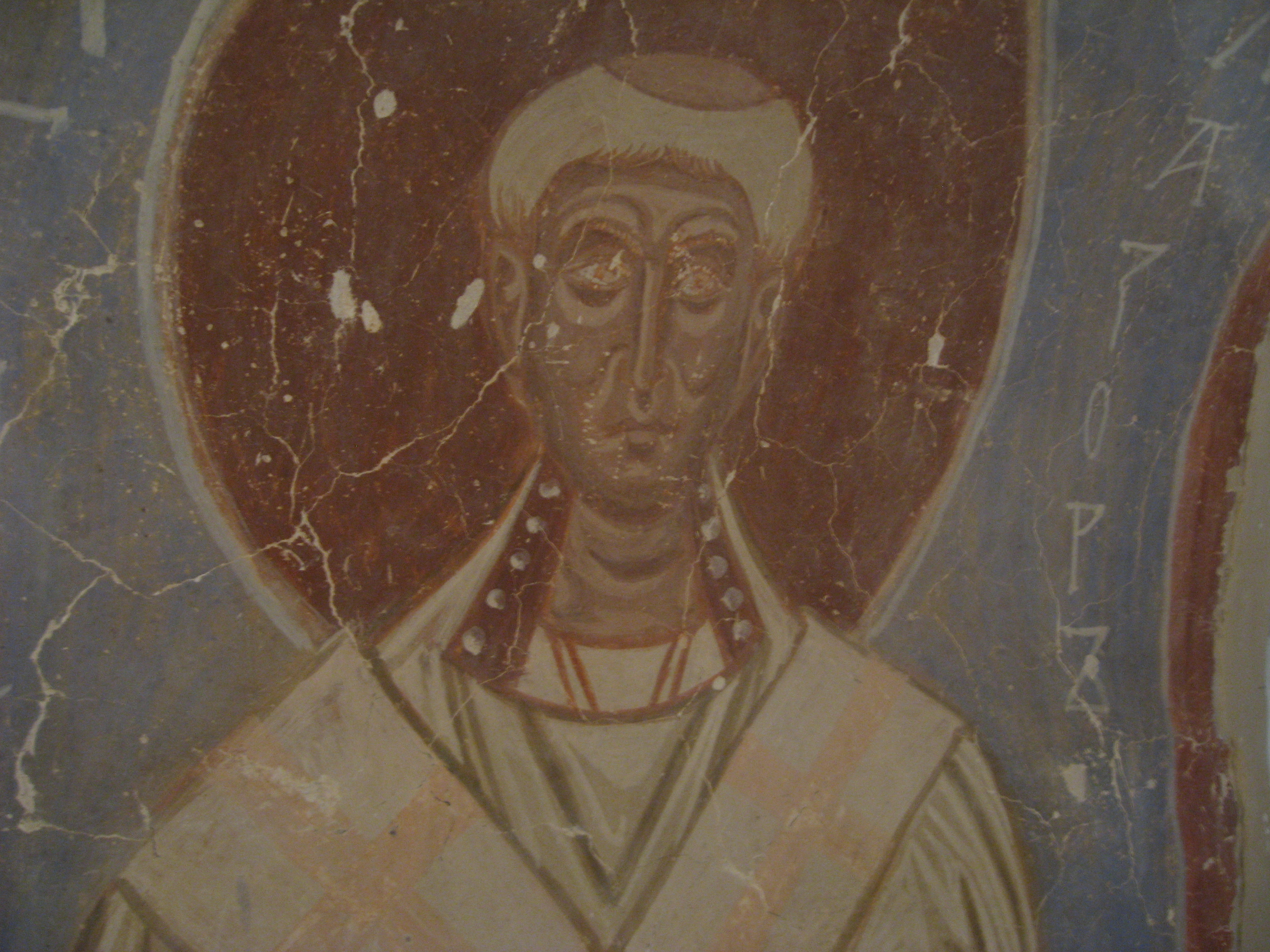 Фреска в алтаре Николо-Дворищенского собора в Великом Новгороде.